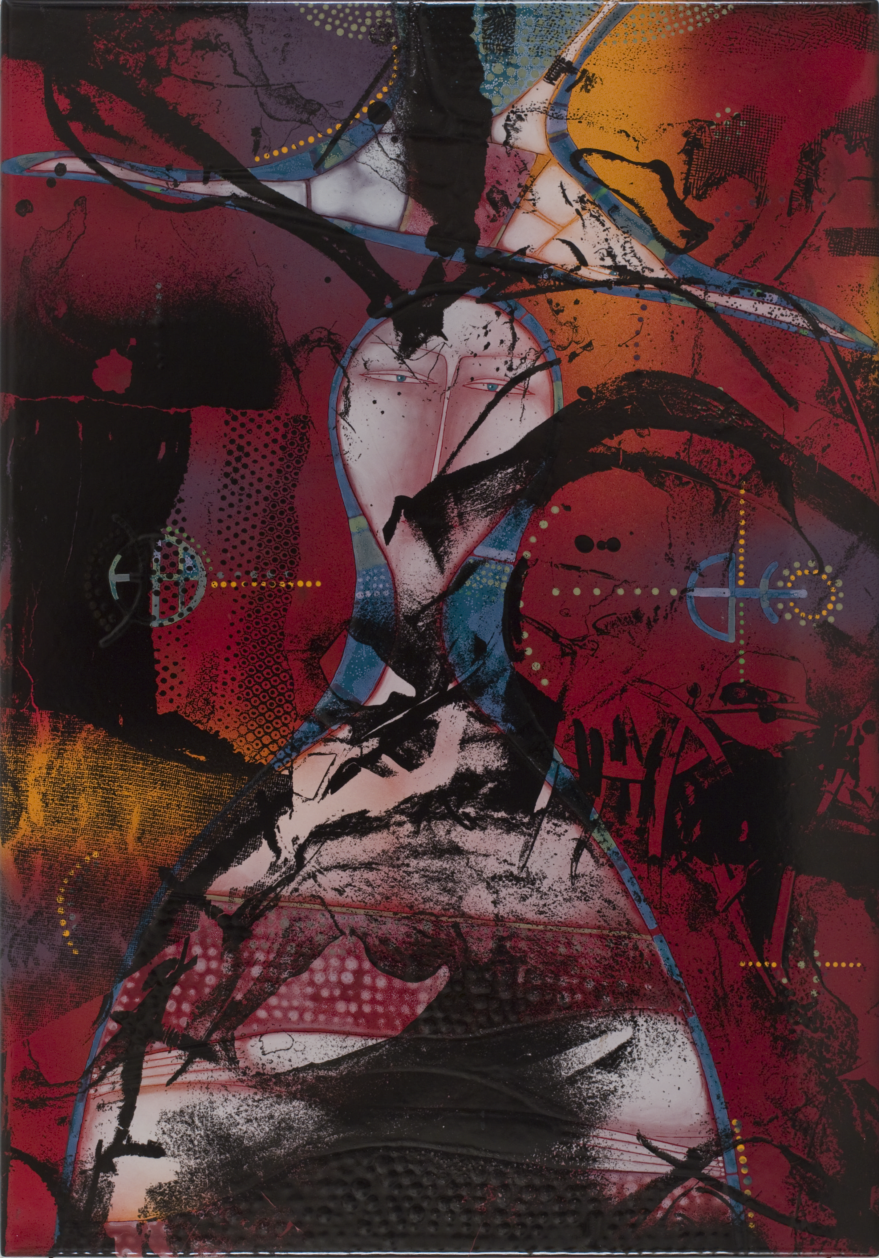 "Фигура с птицей", медь/горячая эмаль, автор Алексей Мукушев[1]